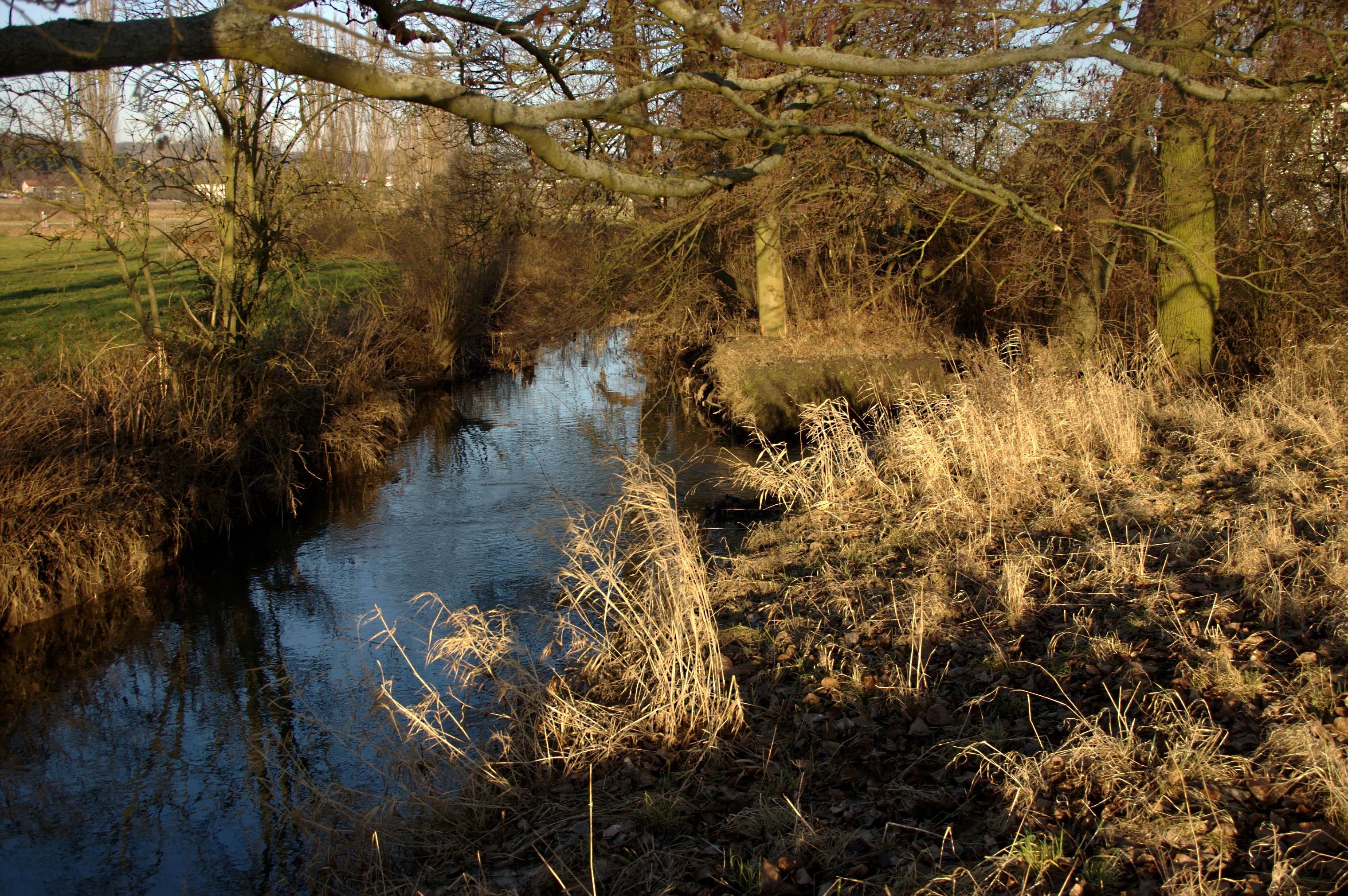 Die Wieseck bei Gießen-Wieseck